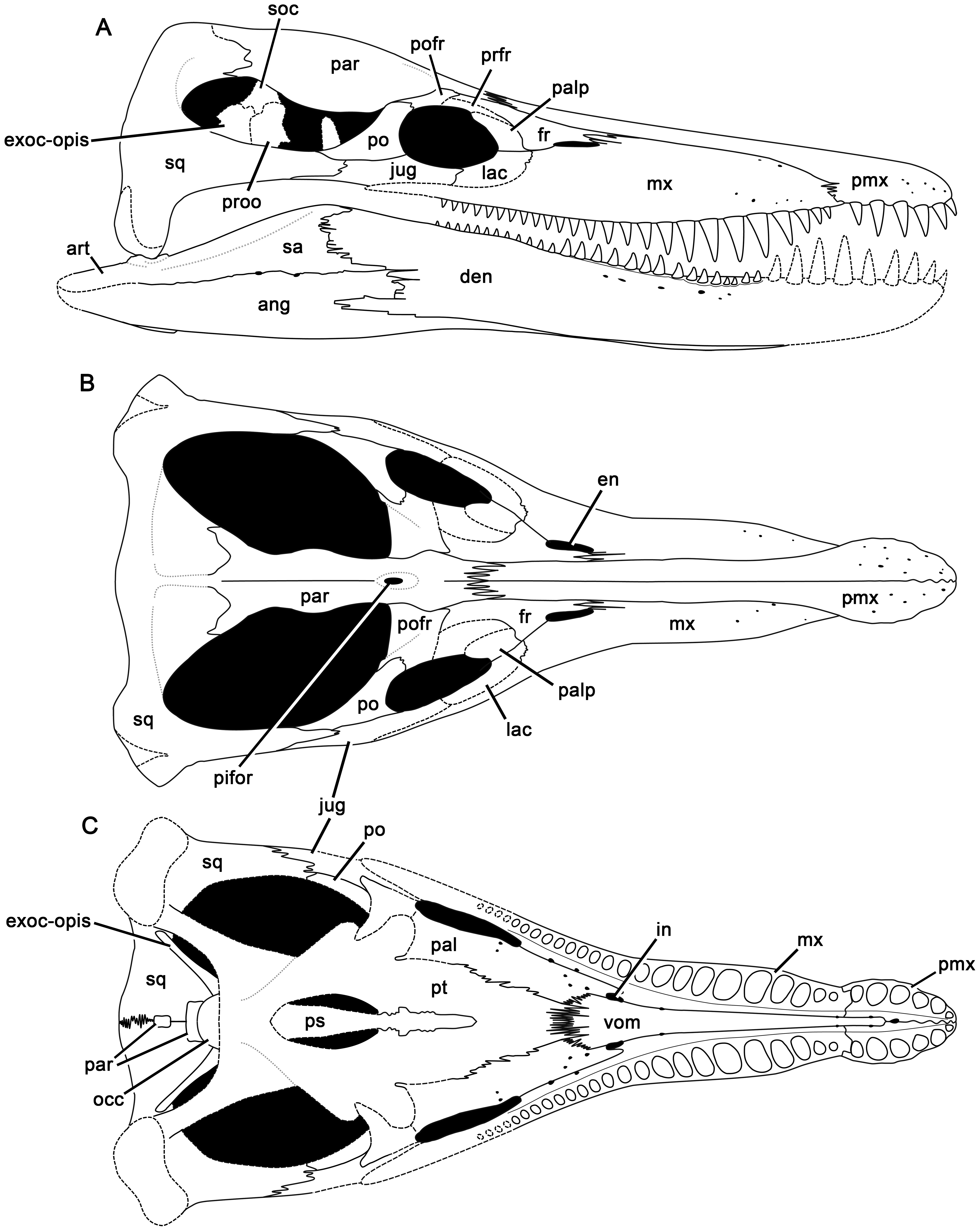 Reconstruction of the skull of Pliosaurus kevani n. sp. In right lateral (A), dorsal (B), and ventral (C) views. Abbreviations: ang, angular; art, articular; den, dentary; en, external naris; exoc-opis, exoccipital-opisthotic; in, internal naris; jug, jugal; fr, frontal; lac, ‘lacrimal’; mx, maxilla; occ, occipital condyle; pal, palatine; palp, palpebral; par, parietal; pifor, pineal foramen; pmx, premaxilla; po, postorbital; pofr, postfrontal; prfr, prefrontal; proo, prootic; ps, parasphenoid; pt, pterygoid; sa, surangular; soc, supraoccipital; sq, squamosal; vom, vomer. Total skull length is approximately 2 metres.